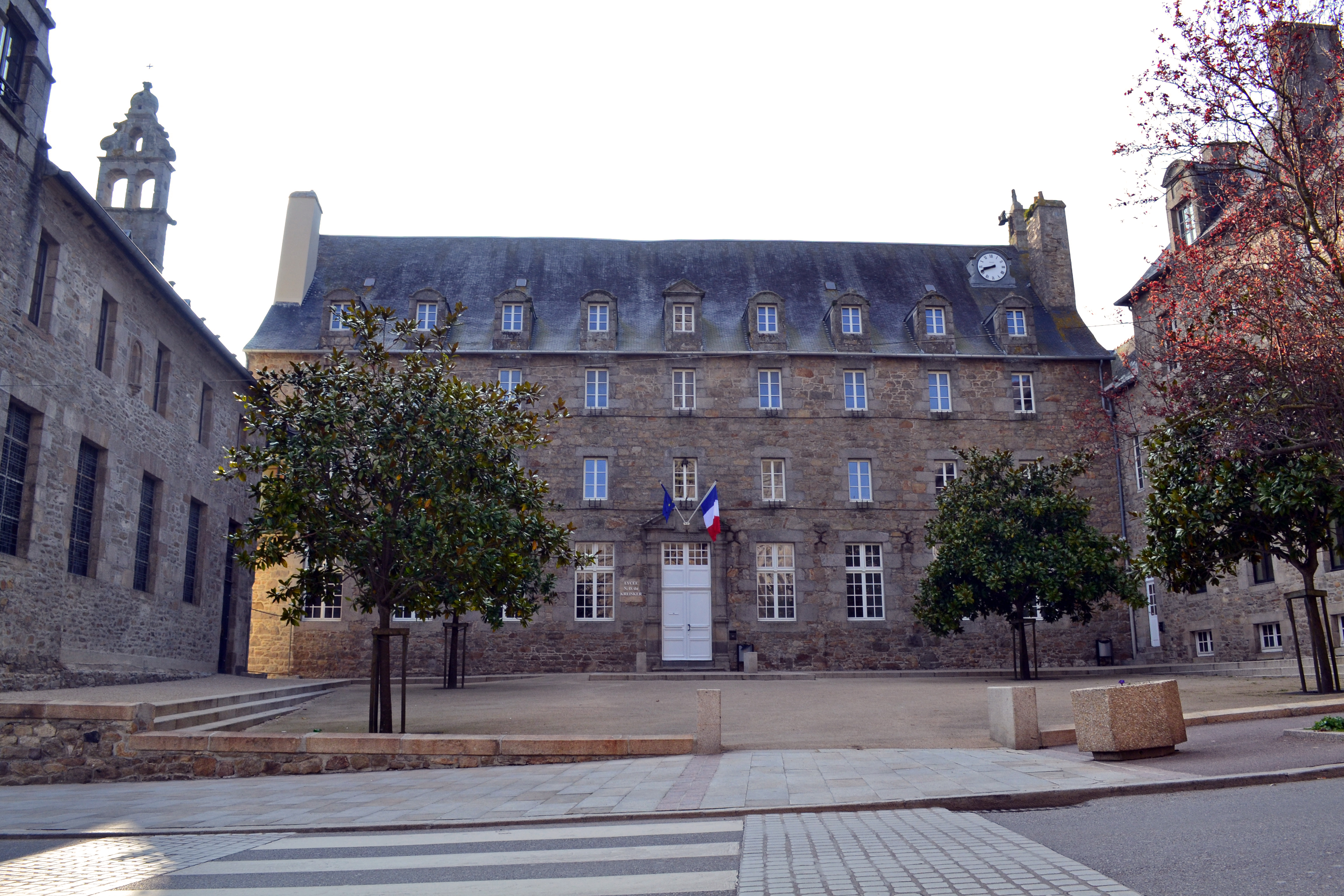 Cour d'honneur du lycée du Kreisker à Saint-Pol-de-Léon.